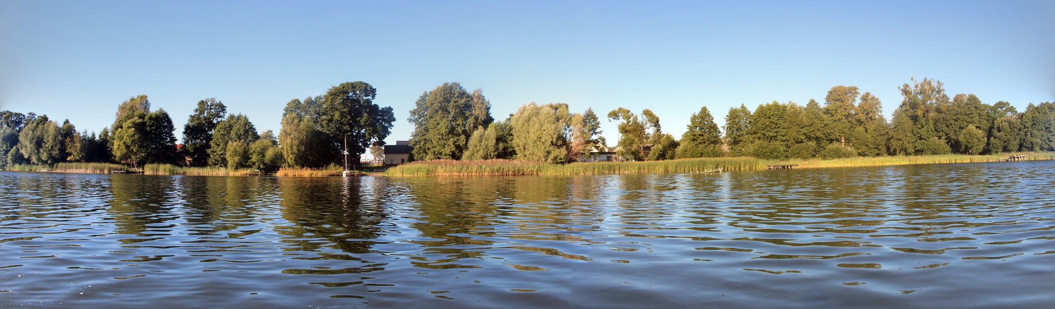 Panorama Urszulewa od strony jeziora